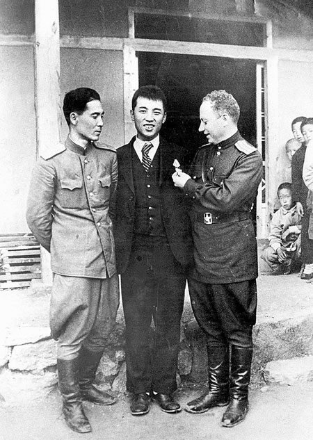 1945년 10월 14일 평양시 민중대회에서 김일성이 처음 대중들 앞에 나선 날의 사진. 좌로부터 강미하일 소련군 소좌 (고려인), 소련 적기 훈장을 단 김일성(1912~1994), Grigory Konovich Mekler(1909~2006) 소련군 중좌. Mekler는 이날 집회의 사회를 맡았다.